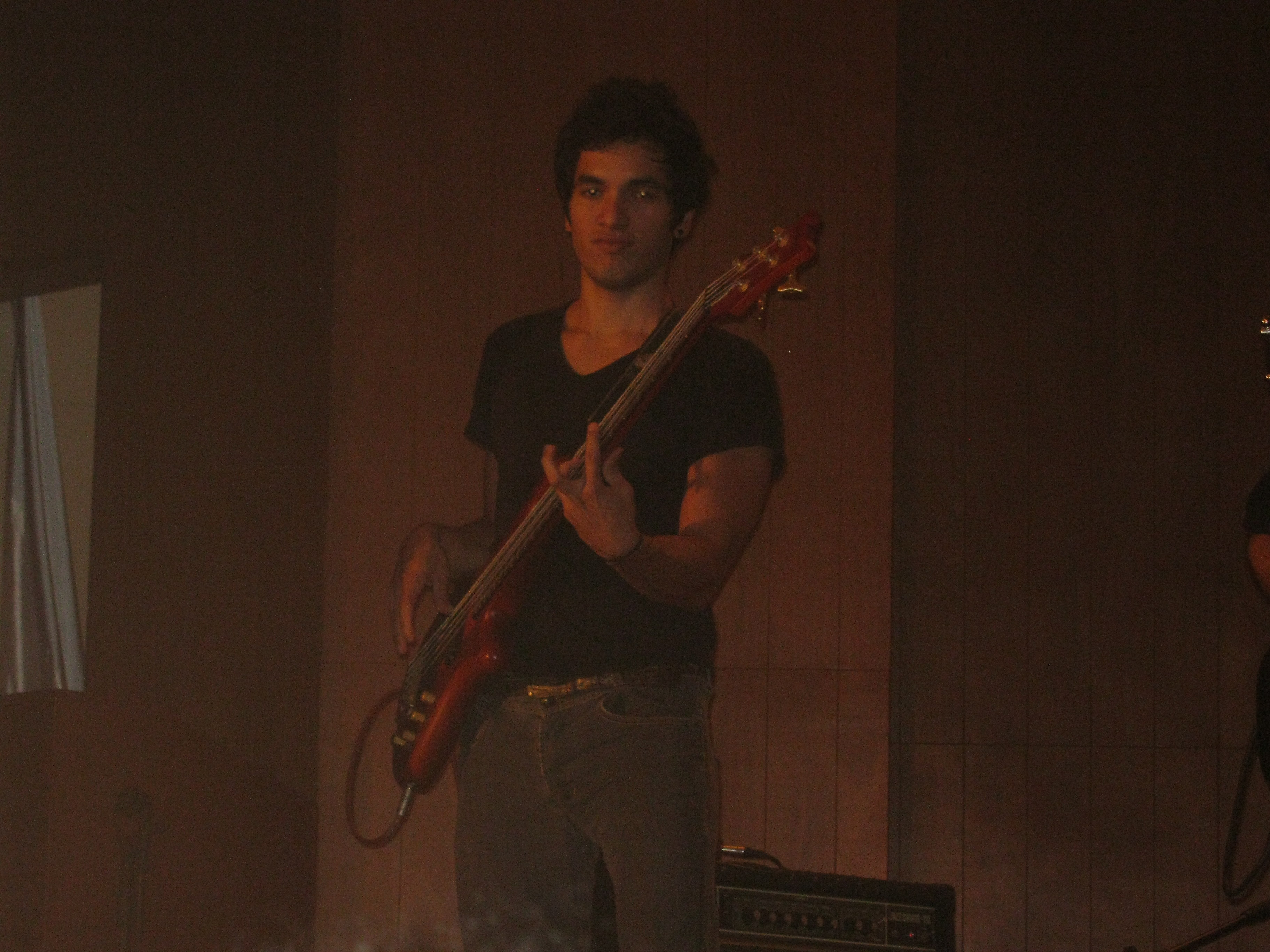 Concierto en conmemoración de los 15 años de la banda caleña de metal progresivo Legend Maker